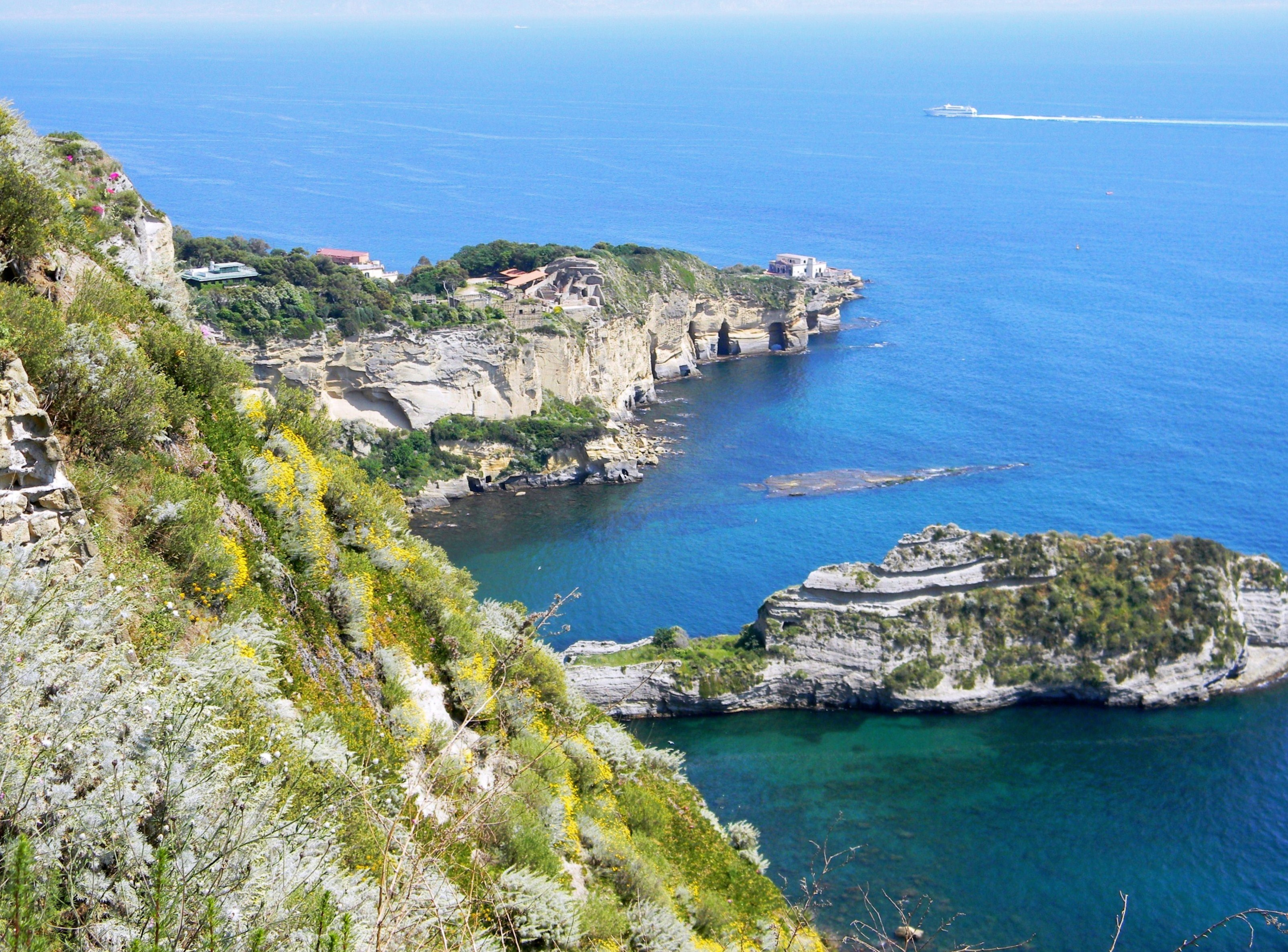 Baia di Trentaremi. 074